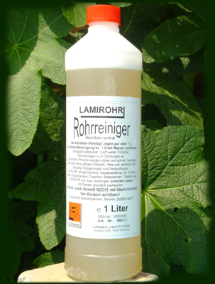 LAMINEX-Reinigungsmittel selbst fotografiertes und bearbeitetes Foto